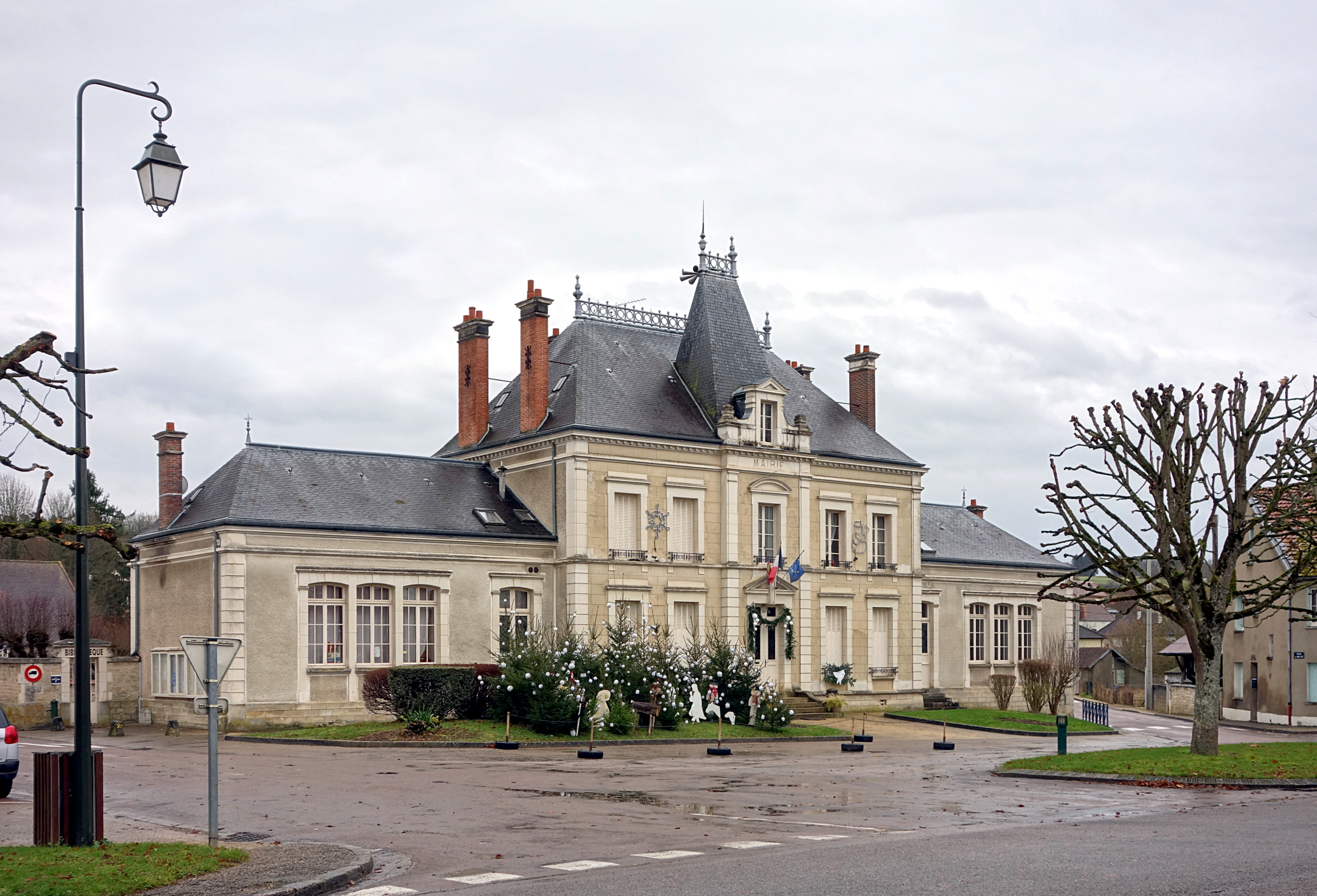 La mairie de Tanlay.